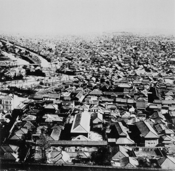 Renjakuchō (Chiyoda, Tokyo)